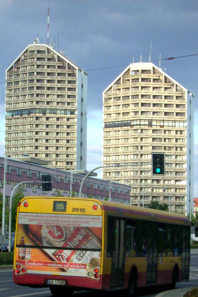 Wrocław - domy studenckie "Kredka i Ołówek" (widok z Pl. Grunwaldzkiego)